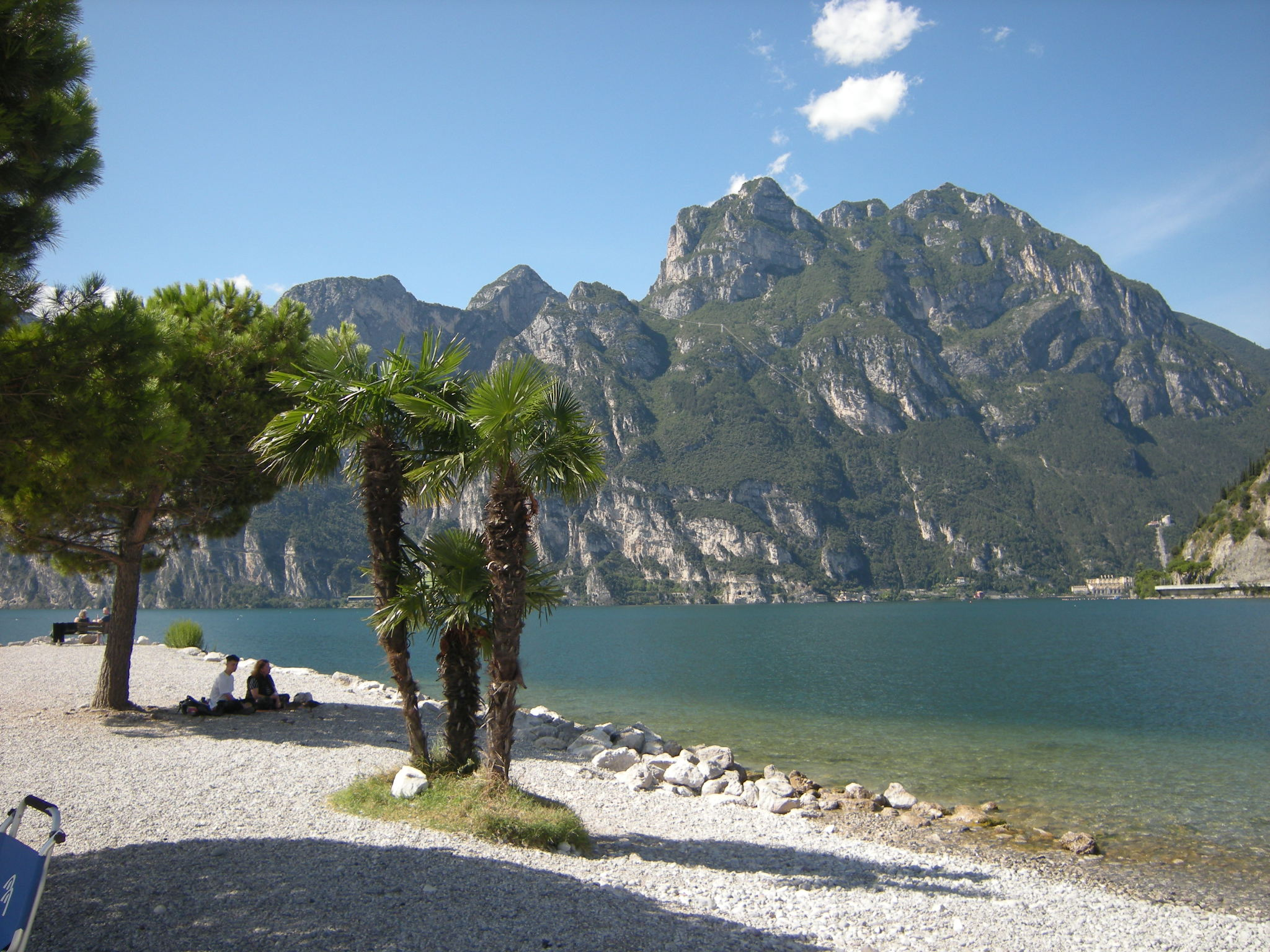 Lido di Arco, nella frazione di Linfano